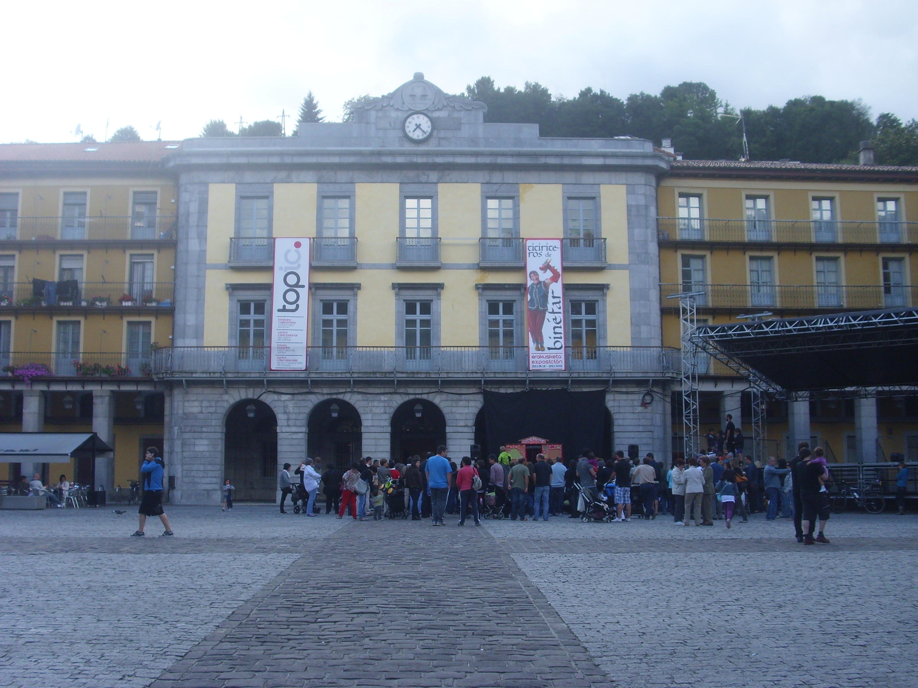 Museo "Topic" de Marionetas, en Tolosa, Gipuzkoa